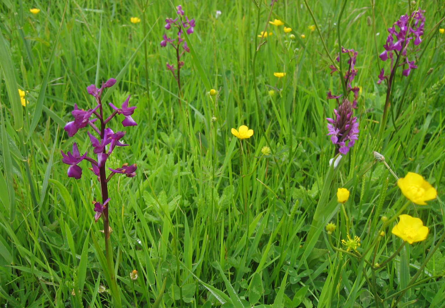 Orchideenwiese im Naturschutzgebiet Pré Noir auf der Kanalinsel Jersey.